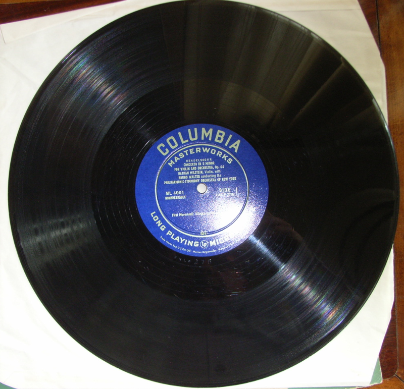 Felix Mendelssohn, Violinkonzert e-Moll op. 64, Philharmonic-Symphony Orchestra Of New York, dir. Bruno Walter, Columbia ML4001.